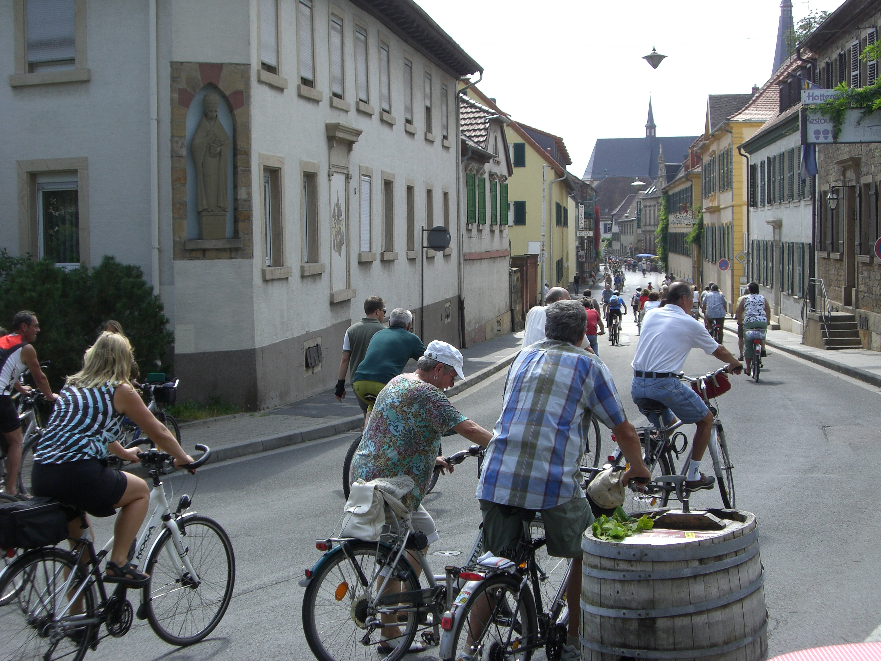 Weinstraßenerlebnistag 2007 in Deidesheim